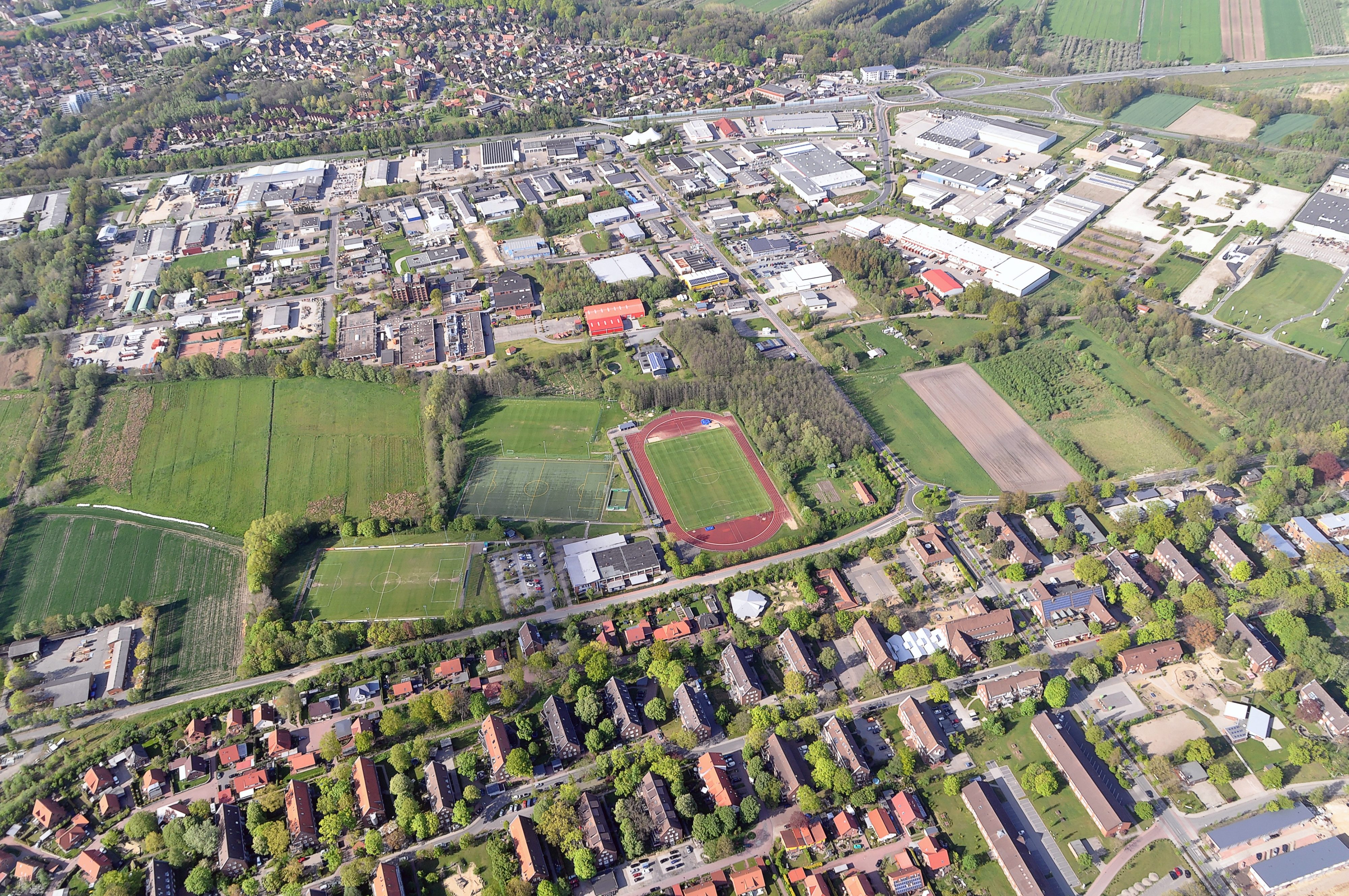 Luftbilder von der Nordseeküste 2012-05